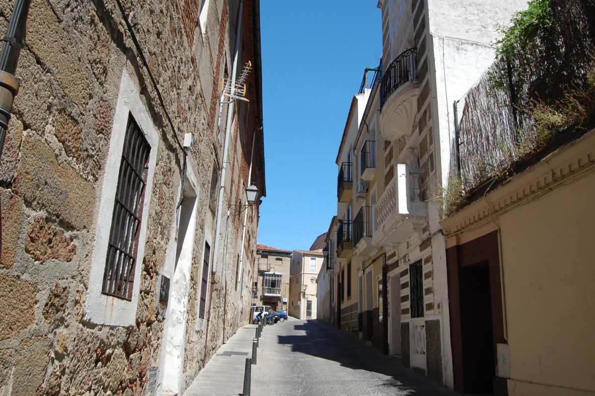 LA MUY NOBLE Y LEAL..NIKON D40 075